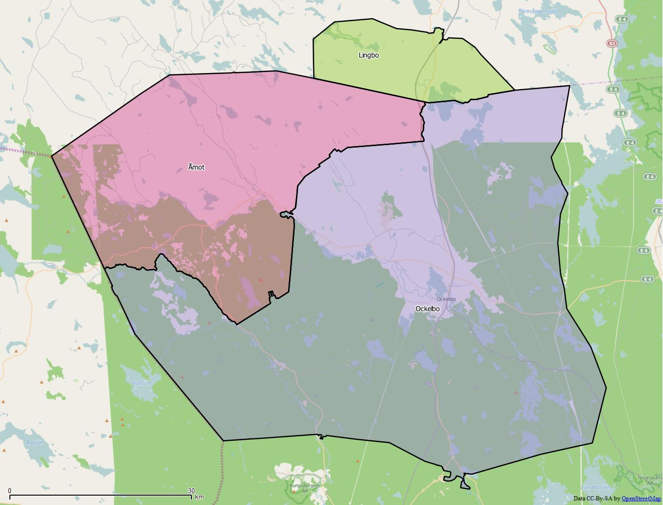 Distriktsindelningen i Ockelbo kommun World file: 81.48921039600729443 0 0 -81.48921039600729443 1787236.48223276250064373 8649758.3682104367762804